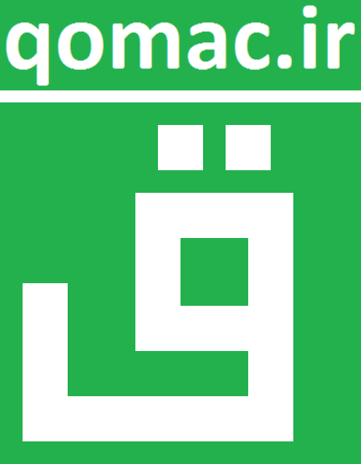 نماد شبکه ی اجتماعی دانشجویان دانشگاه قم به همراه دامنه ی این تارنما